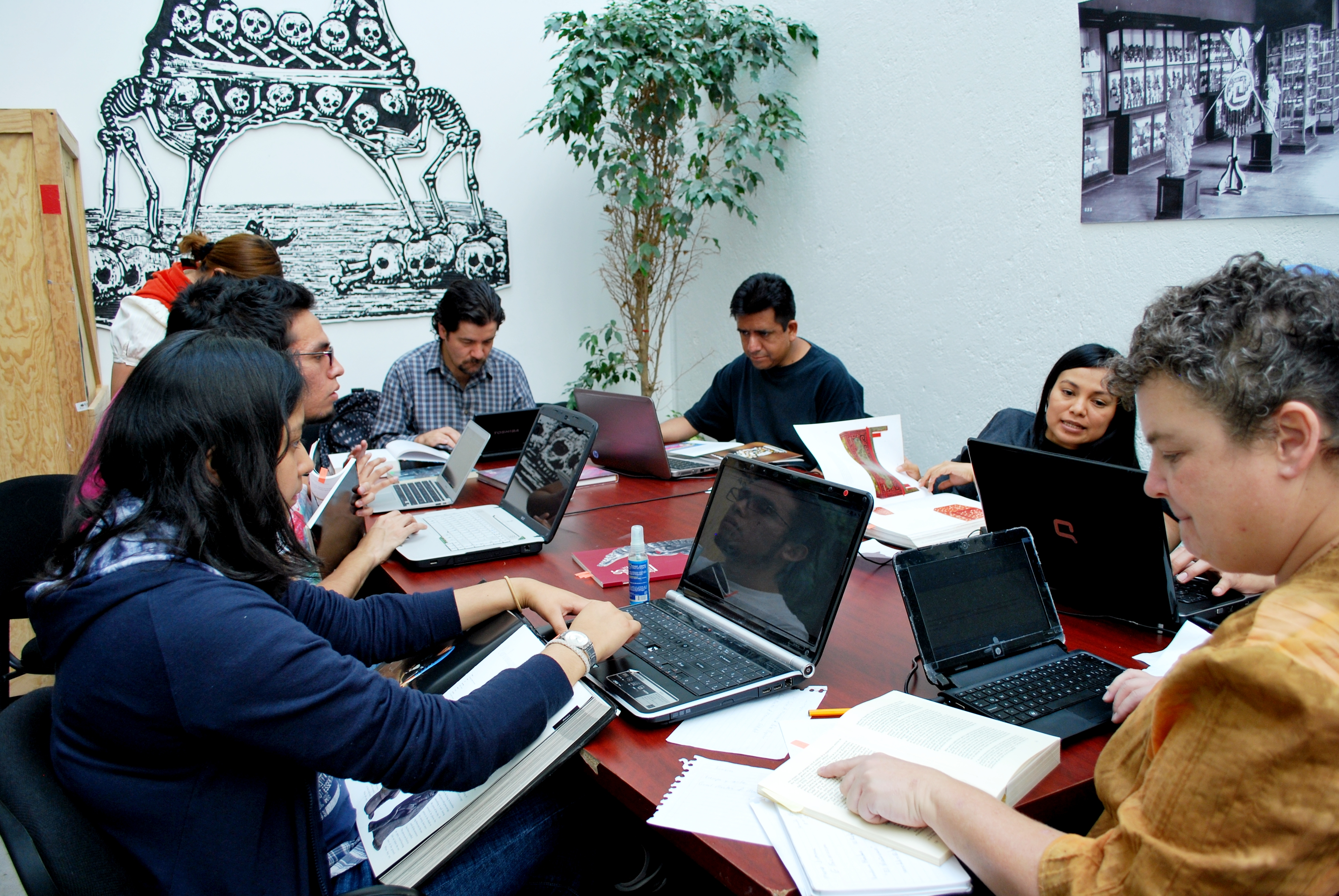 Participantes Editores para MAP